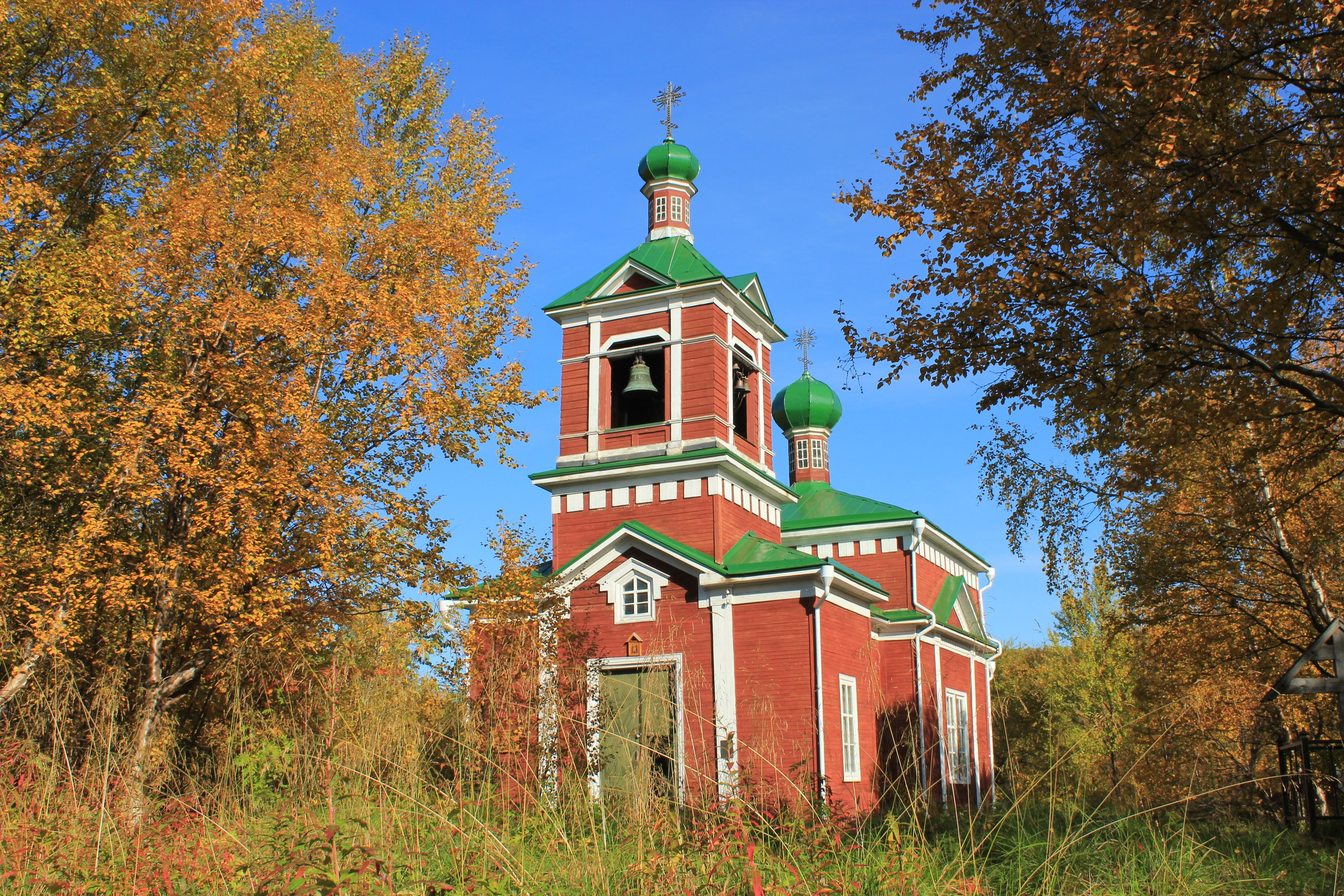 Церковь Бориса и Глеба (деревянная): Мурманская обл., Печенгский район, п.Борисоглебский, левый берег реки Паз